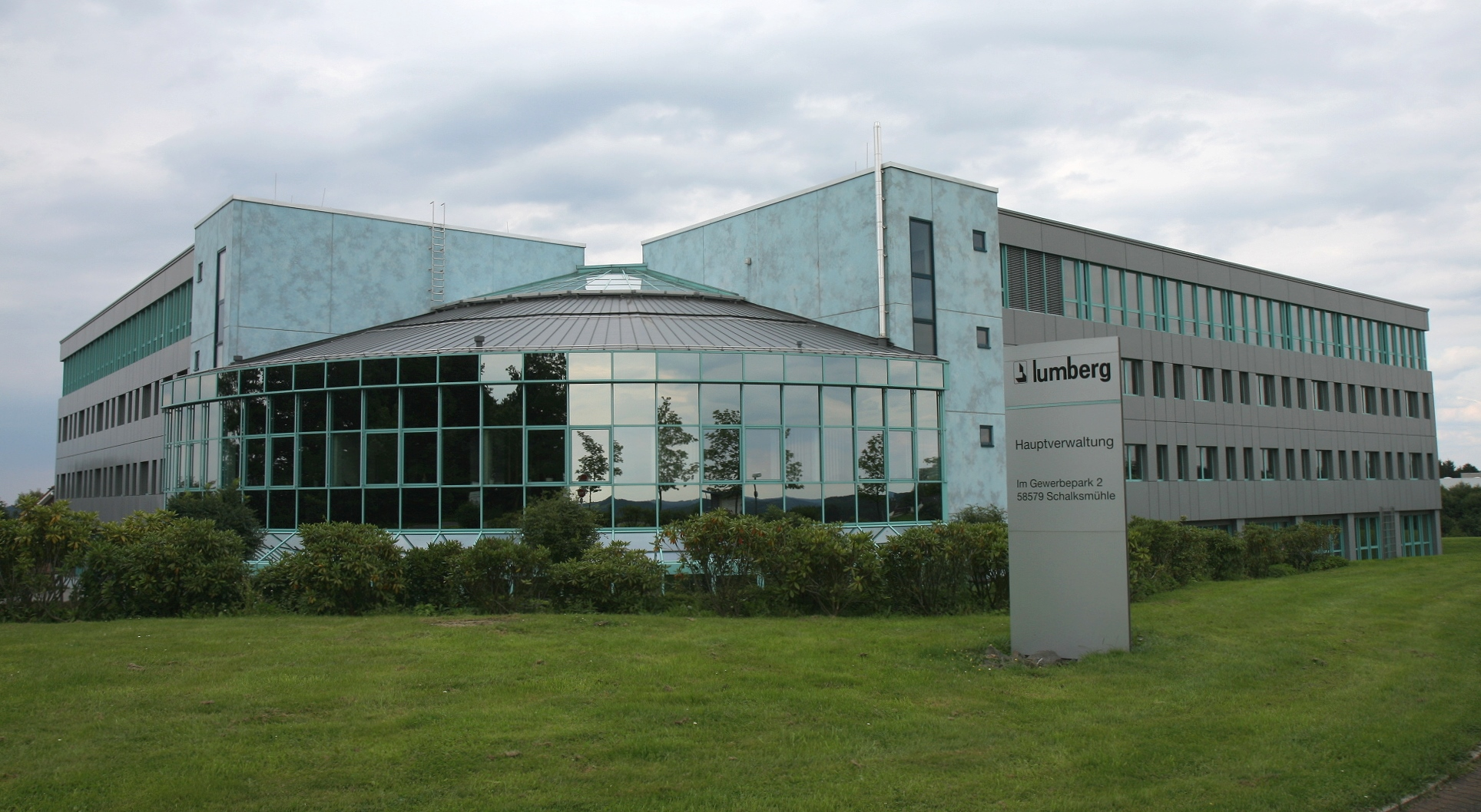 Lumberg Holding GmbH & Co. KG, Im Gewerbepark 2 in Schalksmühle, Gewerbegebiet Ramloh.